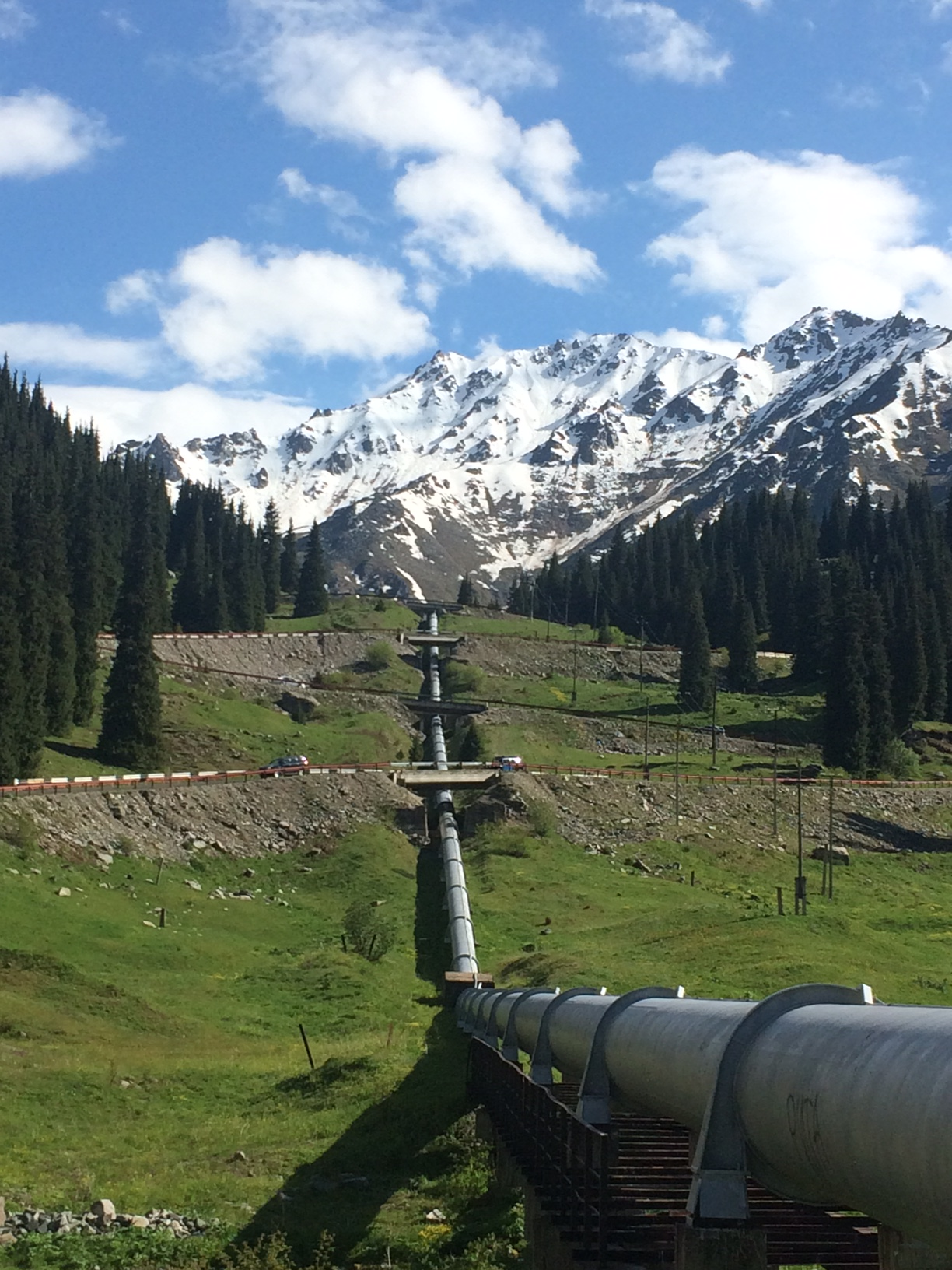 Водозаборная труба с Большого Алматинского Озера